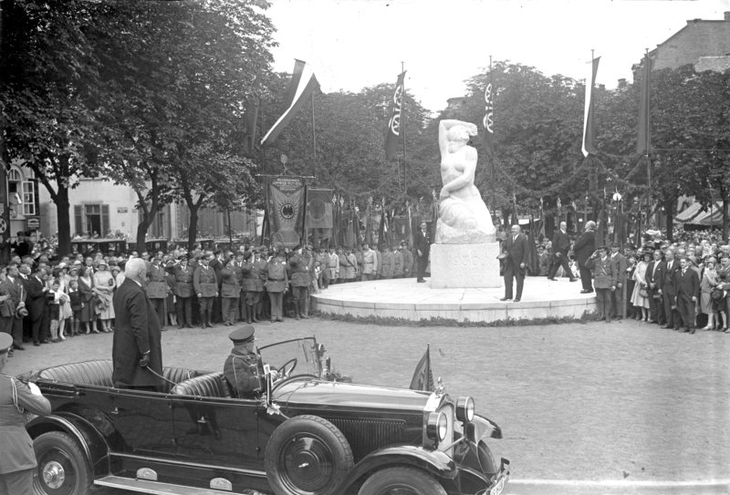 Der jubelnde Empfang des Reichspräsidenten von Hindenburg in Mainz! Die feierliche Enthüllung des Befreiungs-Denkmals auf dem Schillerplatz in Mainz. Vorn im Wagen stehend der Reichspräsident von Hindenburg während der Rede des Mainzer Oberbürgermeisters Dr. Külp am Denkmal.